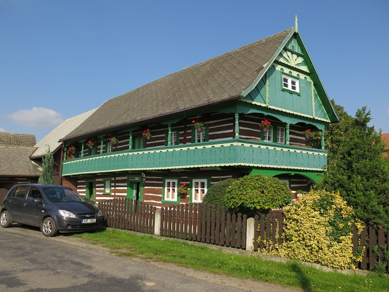 Usedlost čp. 45, Přepeře 45, Přepeře (okres Mladá Boleslav).